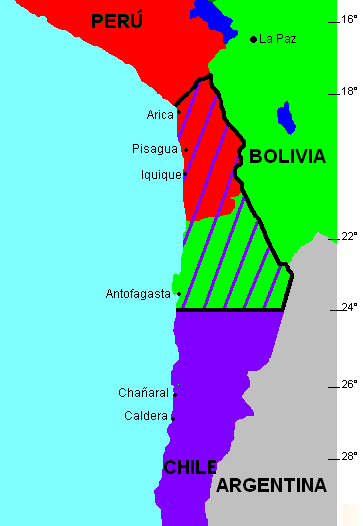 Mapa de las fronteras entre Bolivia, Chile y Perú antes y después de la Guerra del Pacífico de 1879. Versión en español.